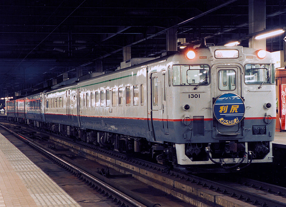 JR北海道 キハ480-1301 急行「利尻」